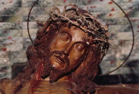 Aidone- EN_Sicilia: Crocifisso di Frate Umile Pintorno da Petralia venerato nella chiesa di Sant'Anna (1635)- particolare.